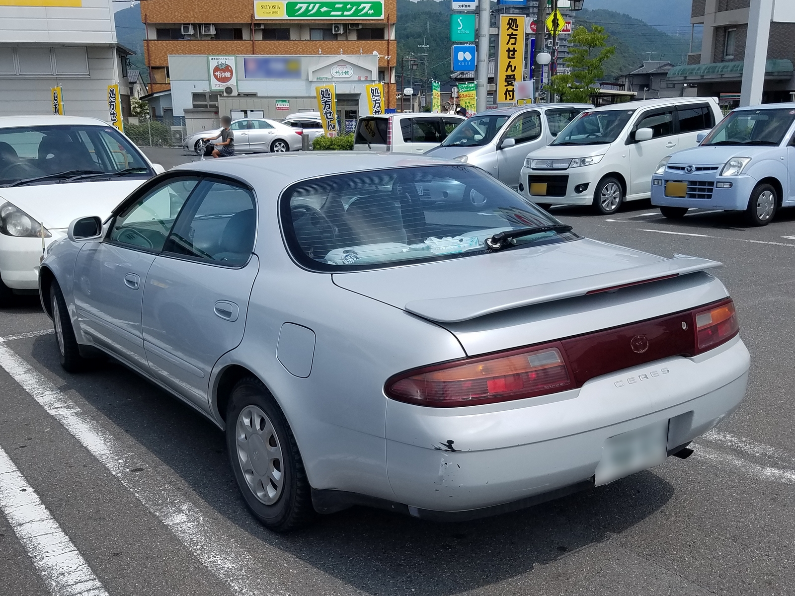 カローラセレス Fタイプ エクストラパッケージ装着車(後期型)